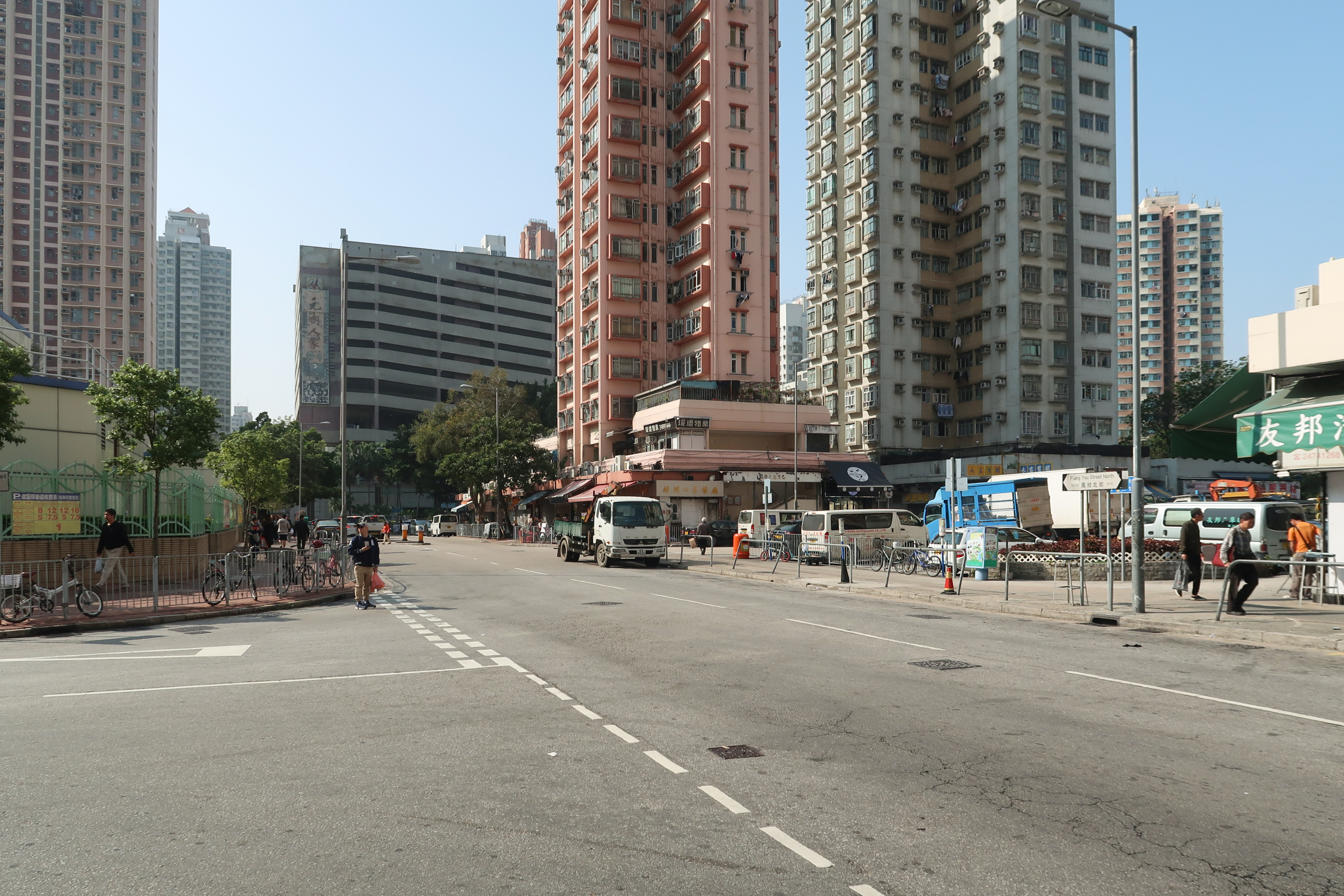 Fung Yau Street North 鳳攸北街